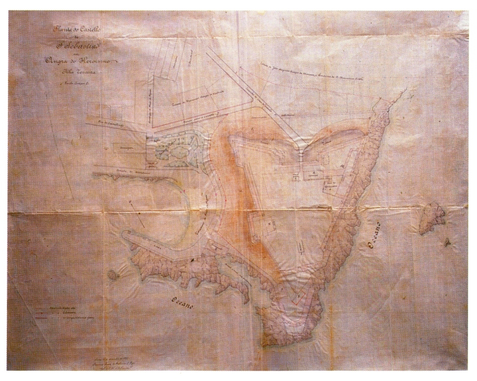 "Planta do Castello de S. Sebastião em Angra do Heroísmo", ilha Terceira, Açores.